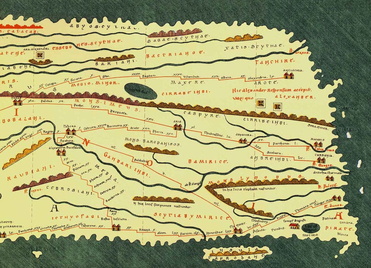 India in the Roman map Tabula Peutingeriana